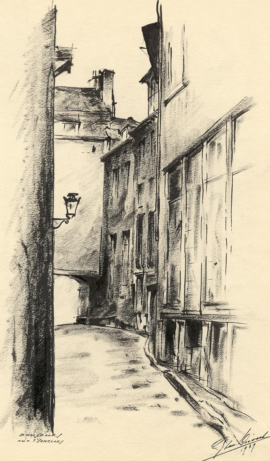 Rue t'Serclaes à Bruxelles, dessin par Léon van Dievoet, architecte, encre de Chine, 20 juillet 1939.